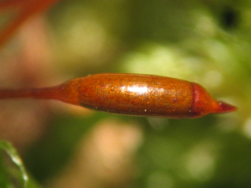 Zypressenschlafmoos (Hypnum cupressiforme), Kapsel, etwa 30x vergrößert